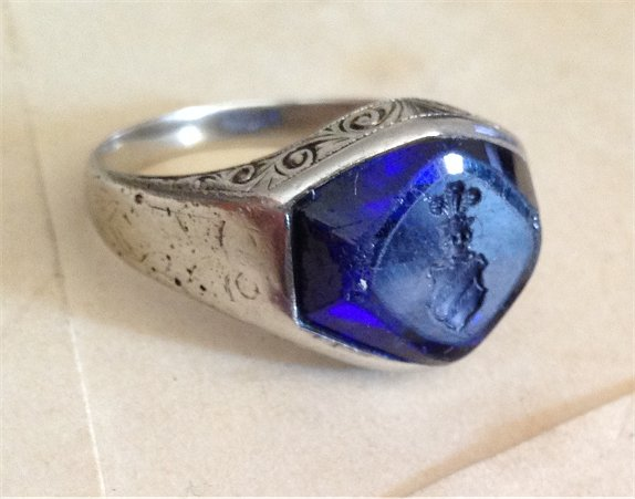 Sygnet herbowy - Jerzego Kossaka. Białe złoto próby 585, szafir naturalny.